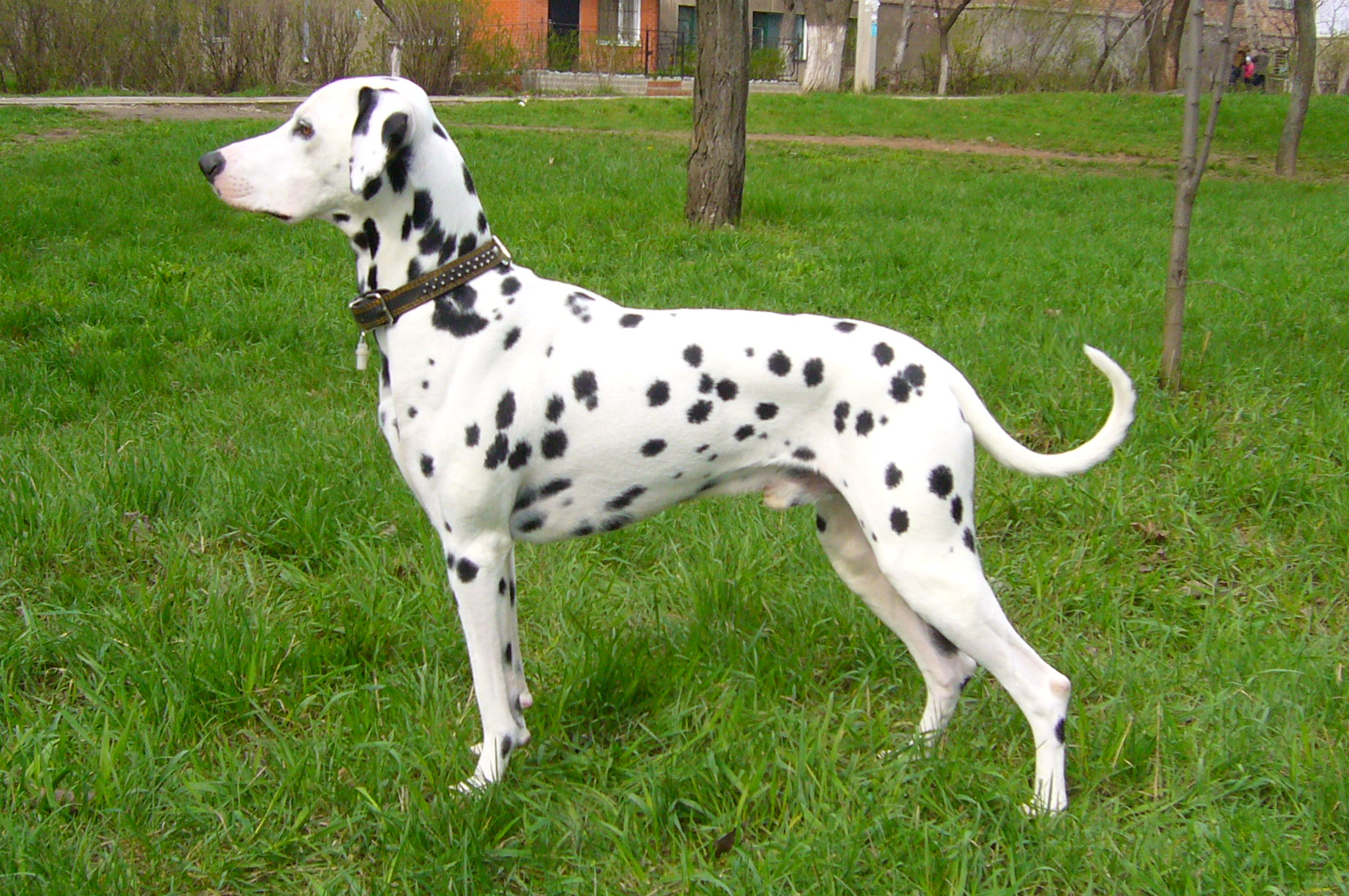 Далматин Бернард Де Лоре. Д.н. 09.07.06 р. Титули: відмінно, R.CAC, САС, Чемпіон України.